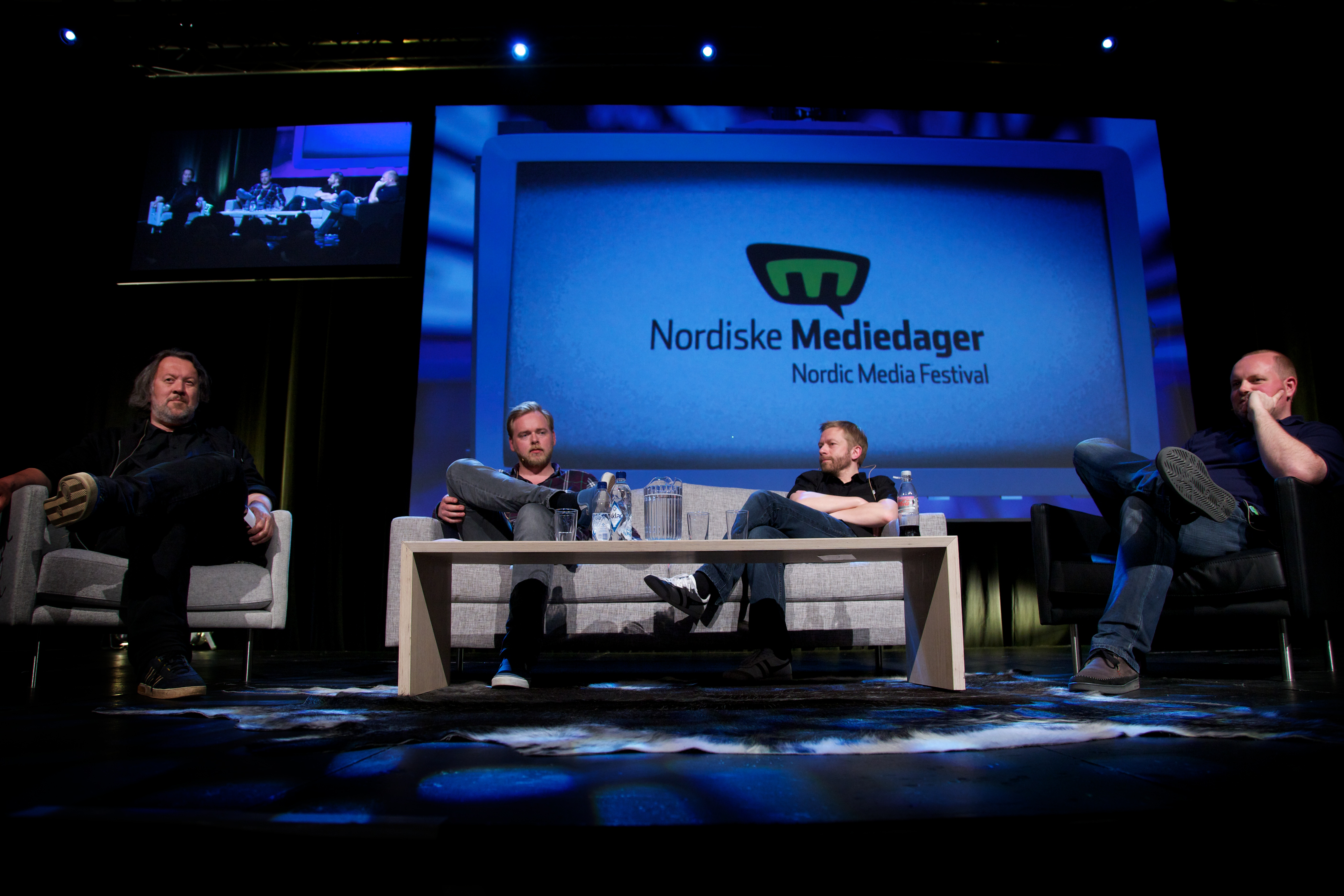 Radioresepsjonen intervjues av Bjørn Eidsvåg under Nordiske Mediedager 2010. Foto: Eirik Helland Urke